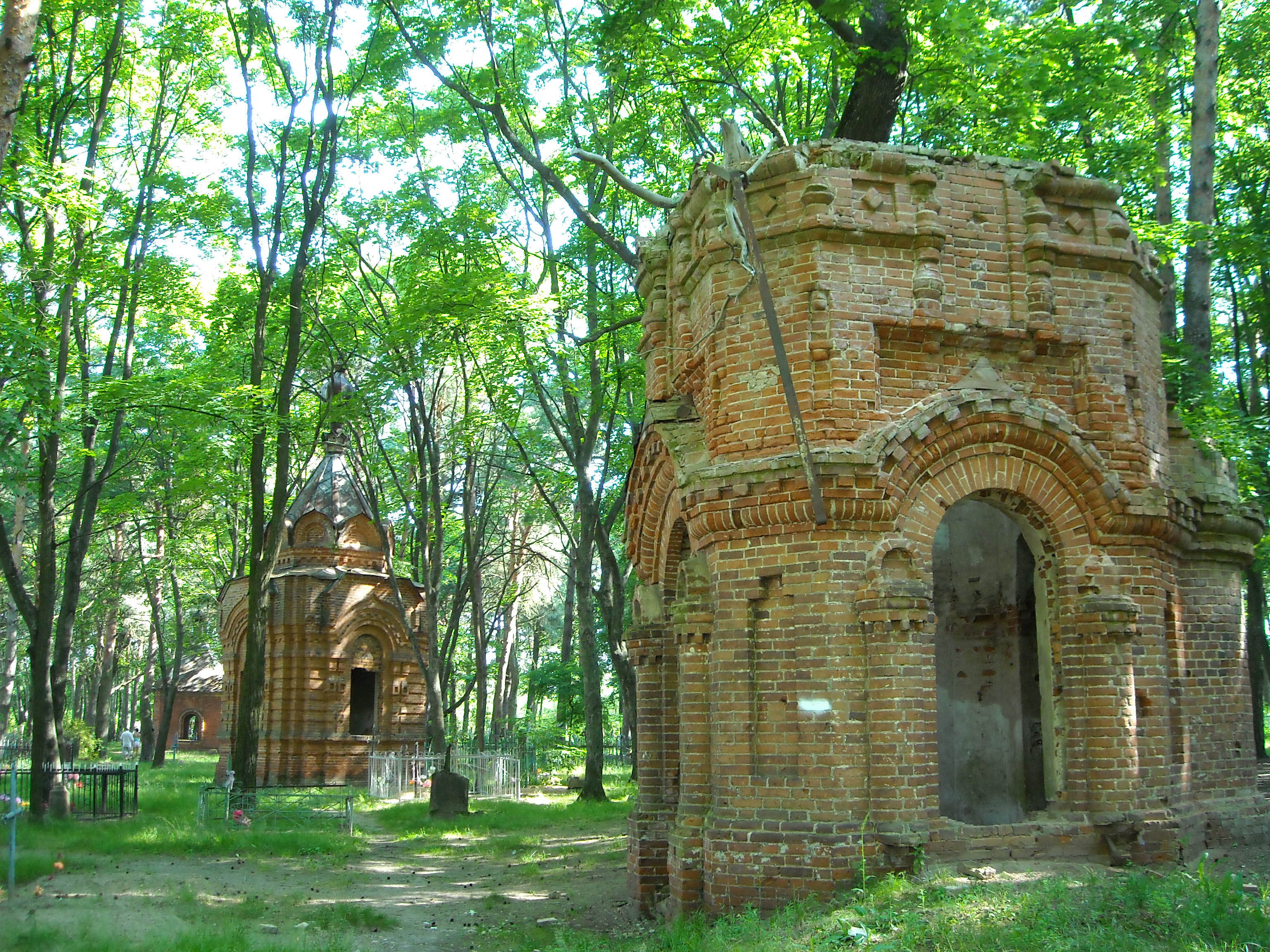 Беларуская (тарашкевіца): Тры капліцы на старых могілках. г. Рагачоў This is a photo of Belarusian heritage monument. Reference number: 313Г000593 ( WLM)